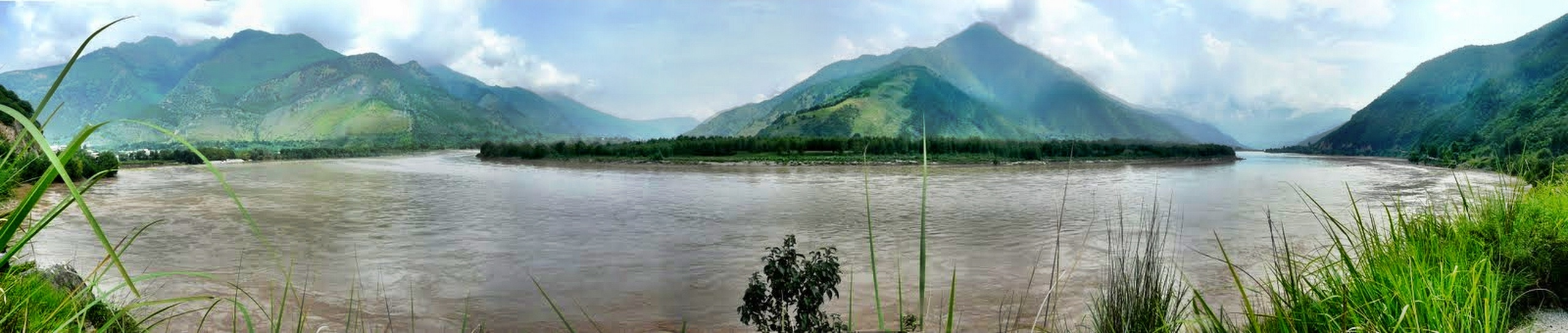 Jangtsekiang-Schleife bei Shigu